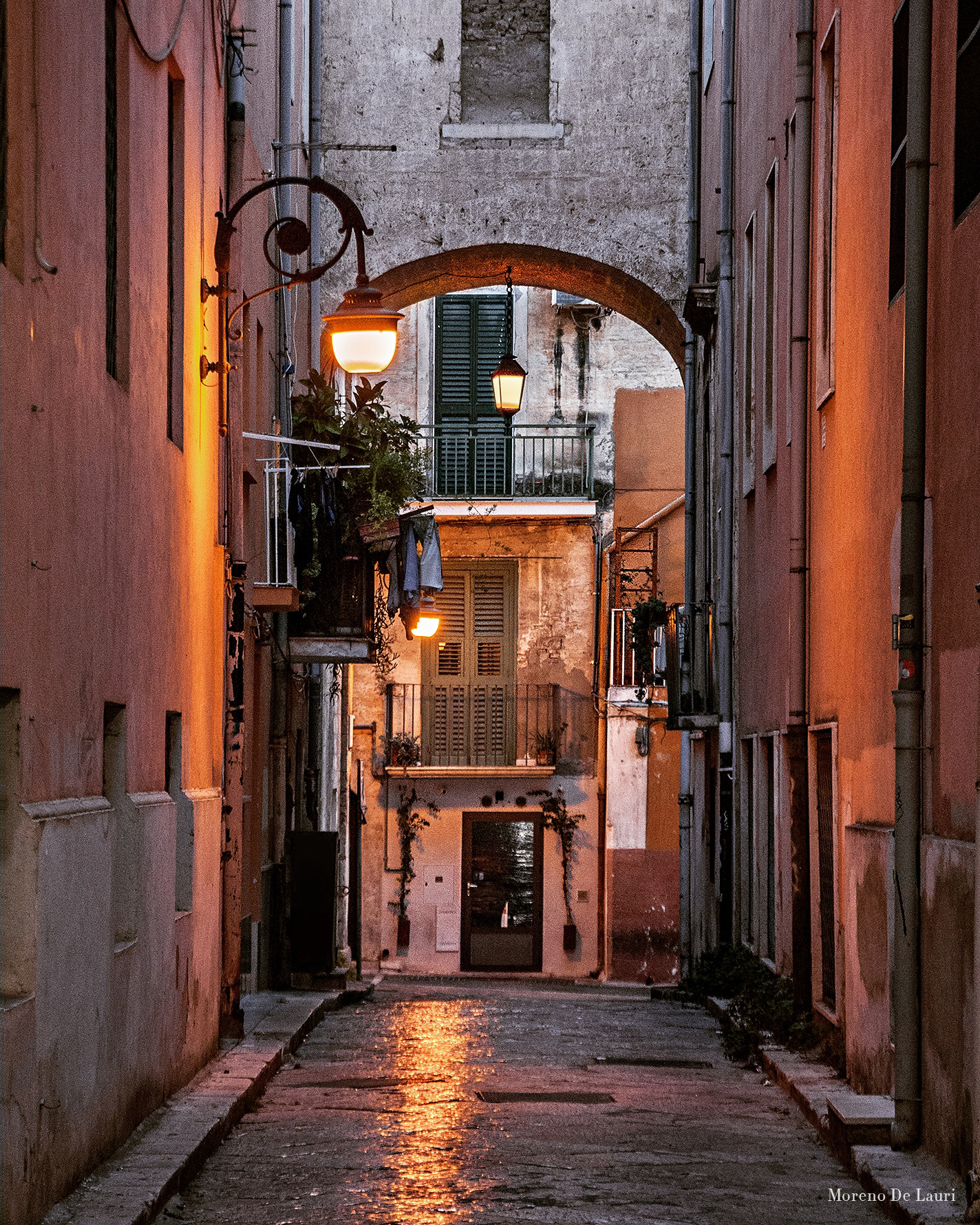 Vicolo centro storico Foggia